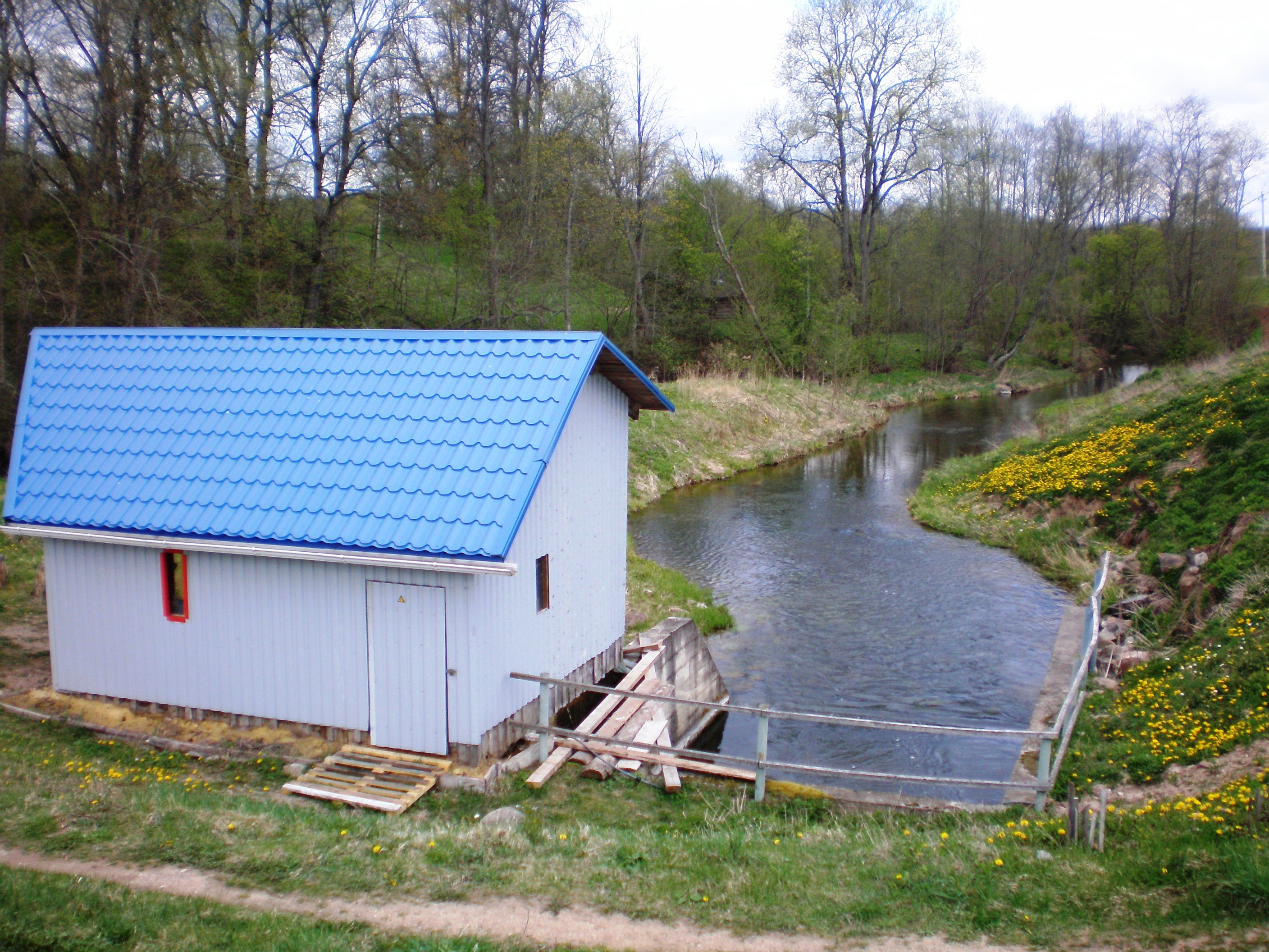 Svobiškio HE, Molėtų raj. 2007.05.05 Foto: Hugo.arg